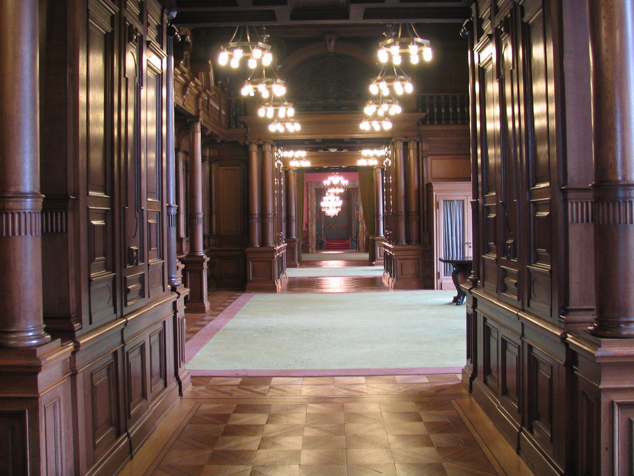 Blickachse in der Villa Hügel